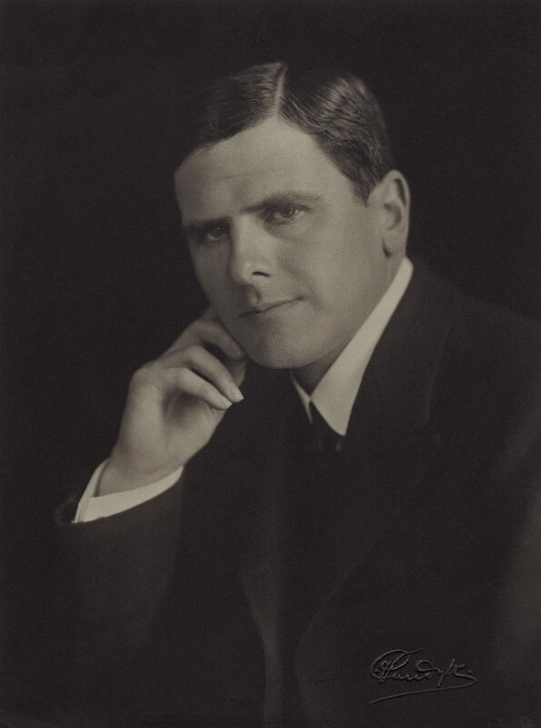 Harold Baker